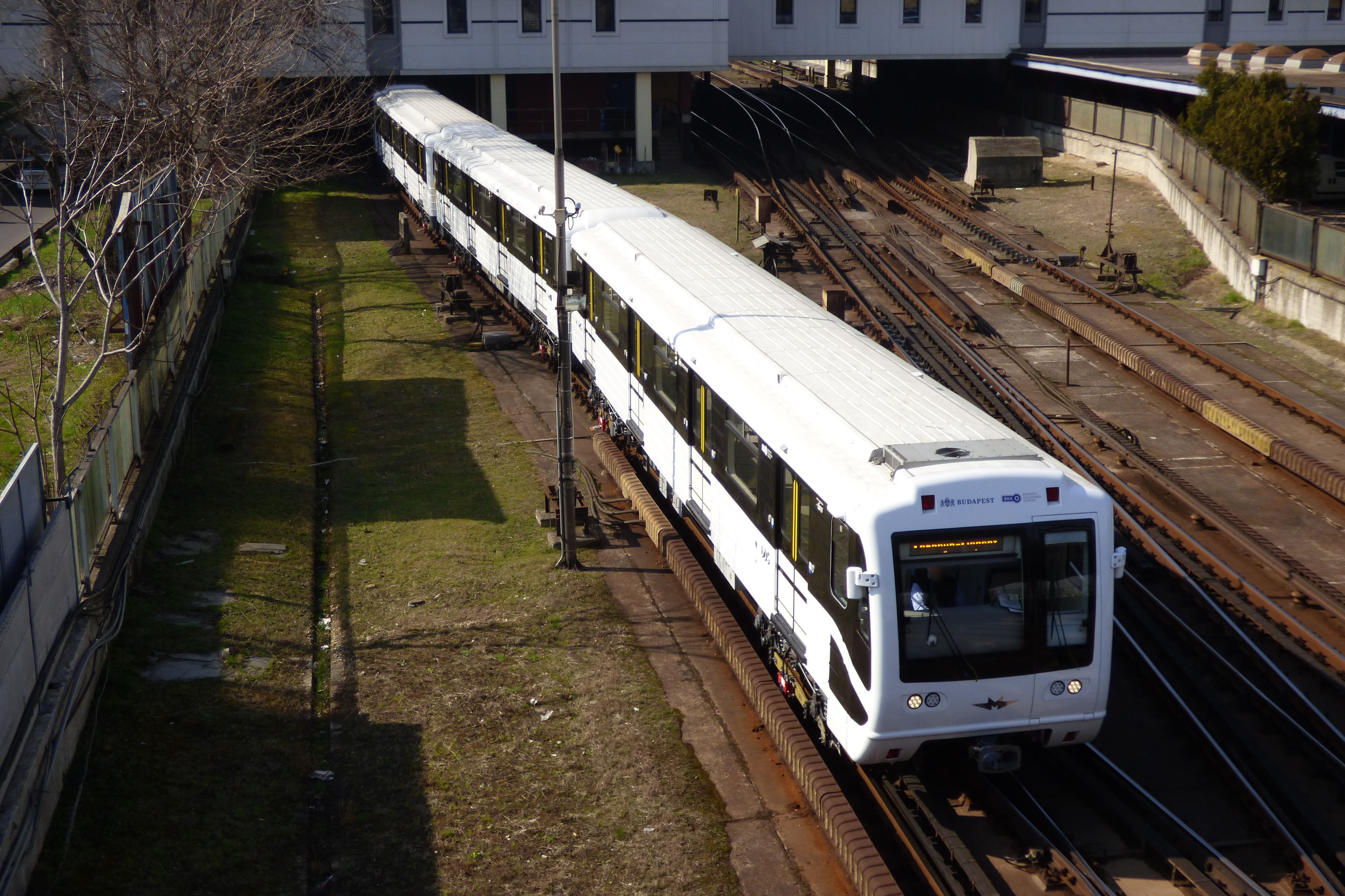 Felújított 81-717-es típusú metró a budapesti 3-as metró Kőbánya-Kispest végállomásán